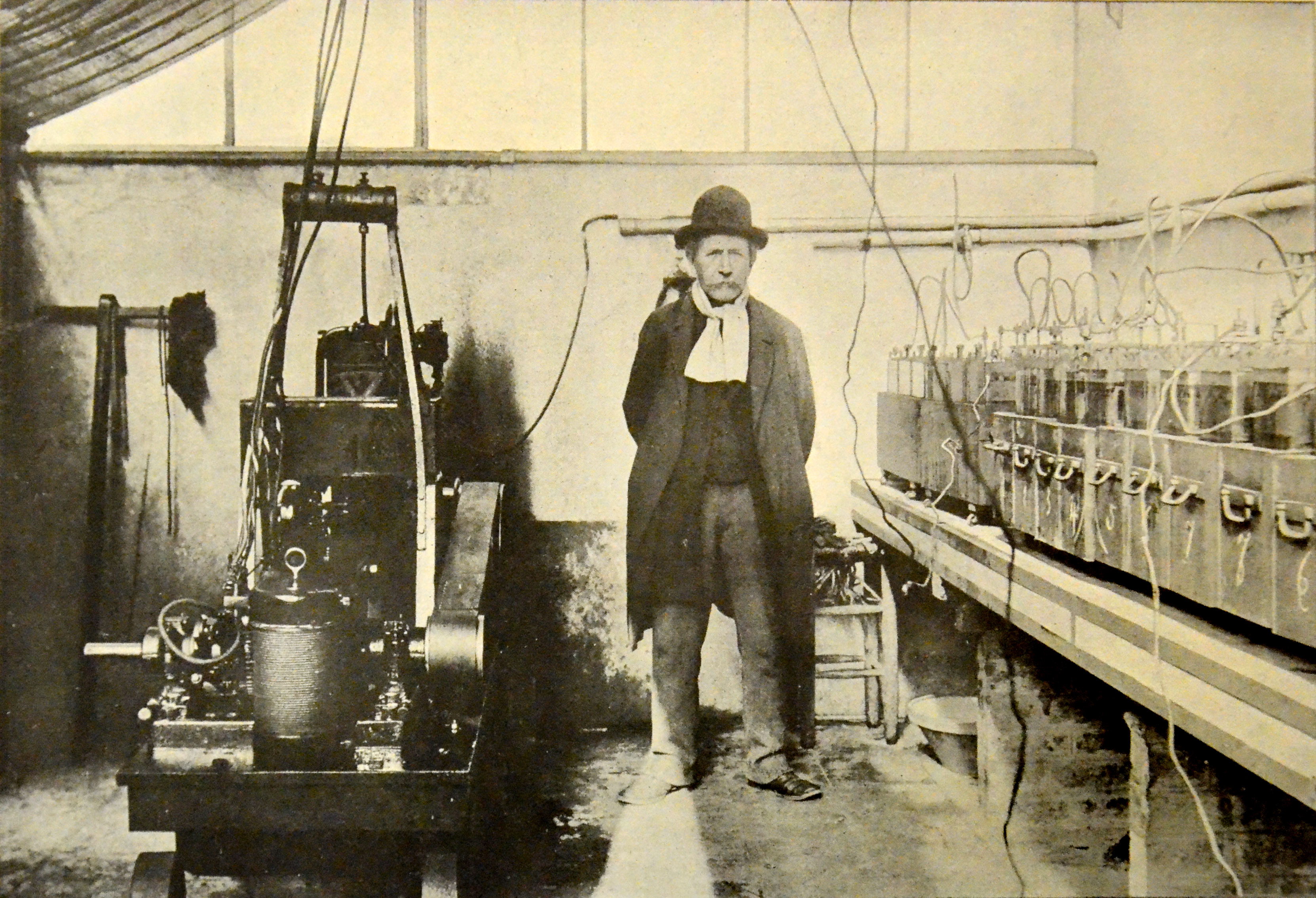 Photo intitulée "Mr. Berthelot dans l'usine électrique de Meudon qui sert à étudier la croissance des plantes", Photo ancienne, extraite d'un article de la revue française "Revue illustrée" (Tome relié 1902), portant sur Pierre Eugène Marcellin Berthelot, né le 25 octobre 1827 à Paris et mort le 18 mars 1907, Cliché : Valérian Gribayedoff.